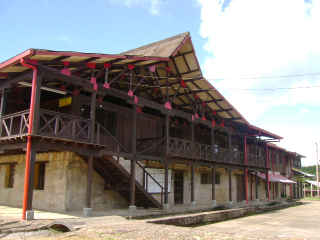 Frente de la Casa Arana, renombrada Casa del Conocimiento, pues luego de haber sido el epicentro del genocidio cometido por la industria cauchera a comienzos del siglo XX, sus instalaciones sirven hoy como centro educativo para los jóvenes indígenas que habitan esta zona de la amazonia colombiana.